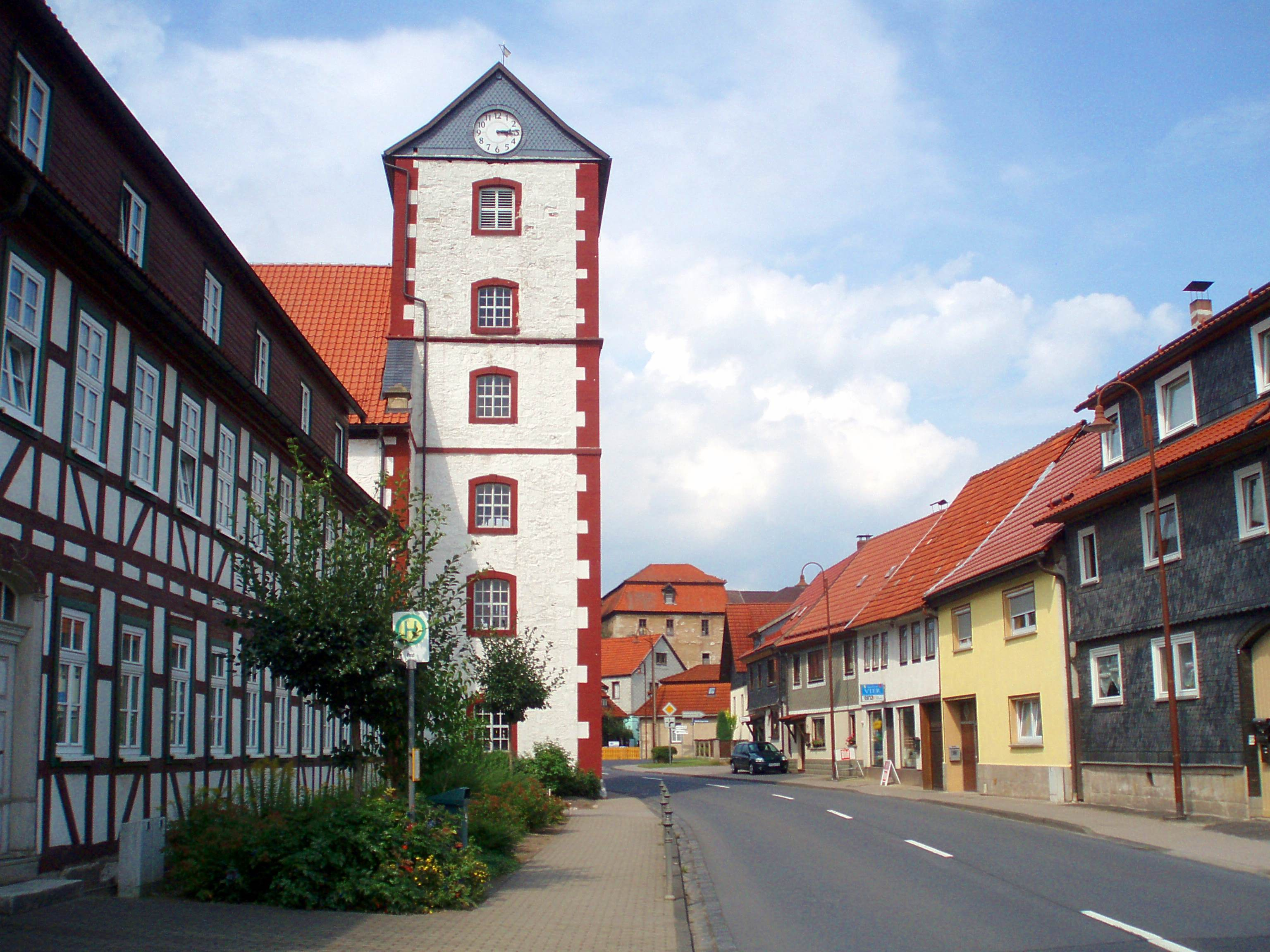 Zentrum von Schwarza